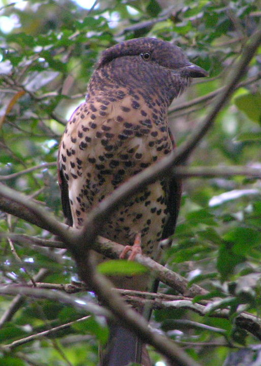 Cuckoo Roller (Leptosomus discolor)